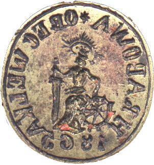 Pečetidlo obce Hrabová z roku 1805.